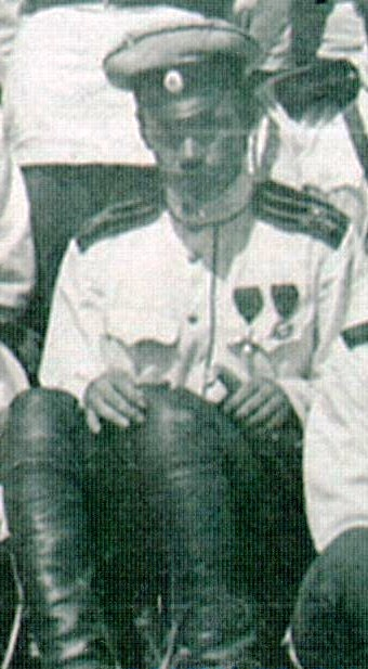 Ф.А. Ізенбек з нагородами. Галліполі, 1921р.